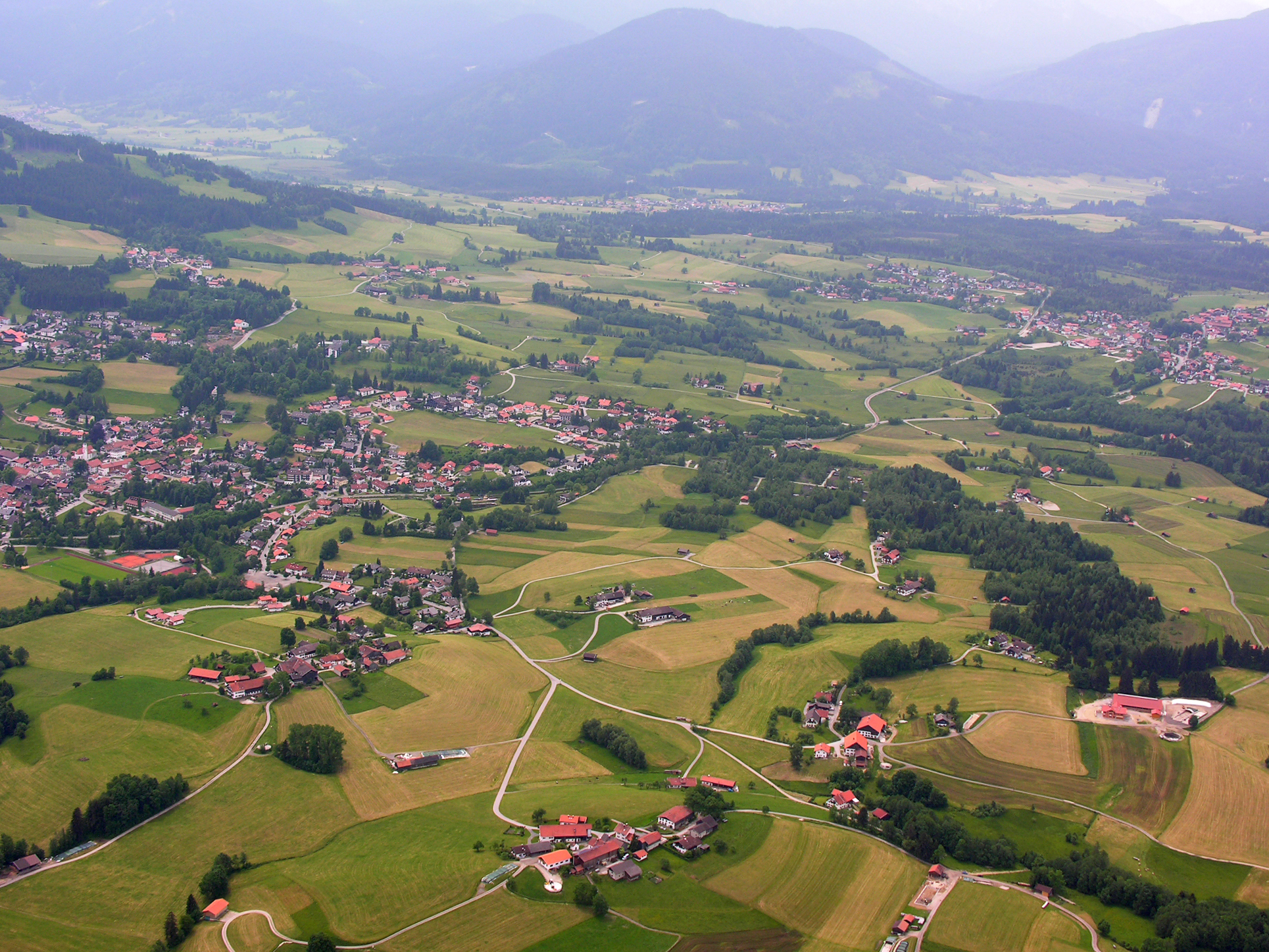 Germany, Bavaria, Bad Kohlgrub